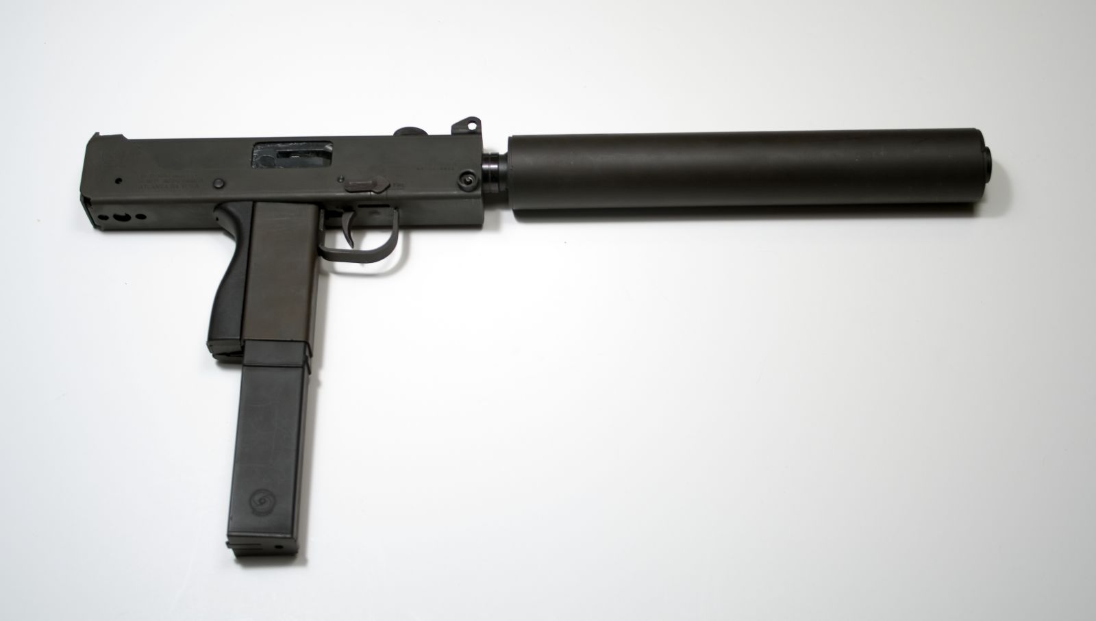 Cobray m11/9